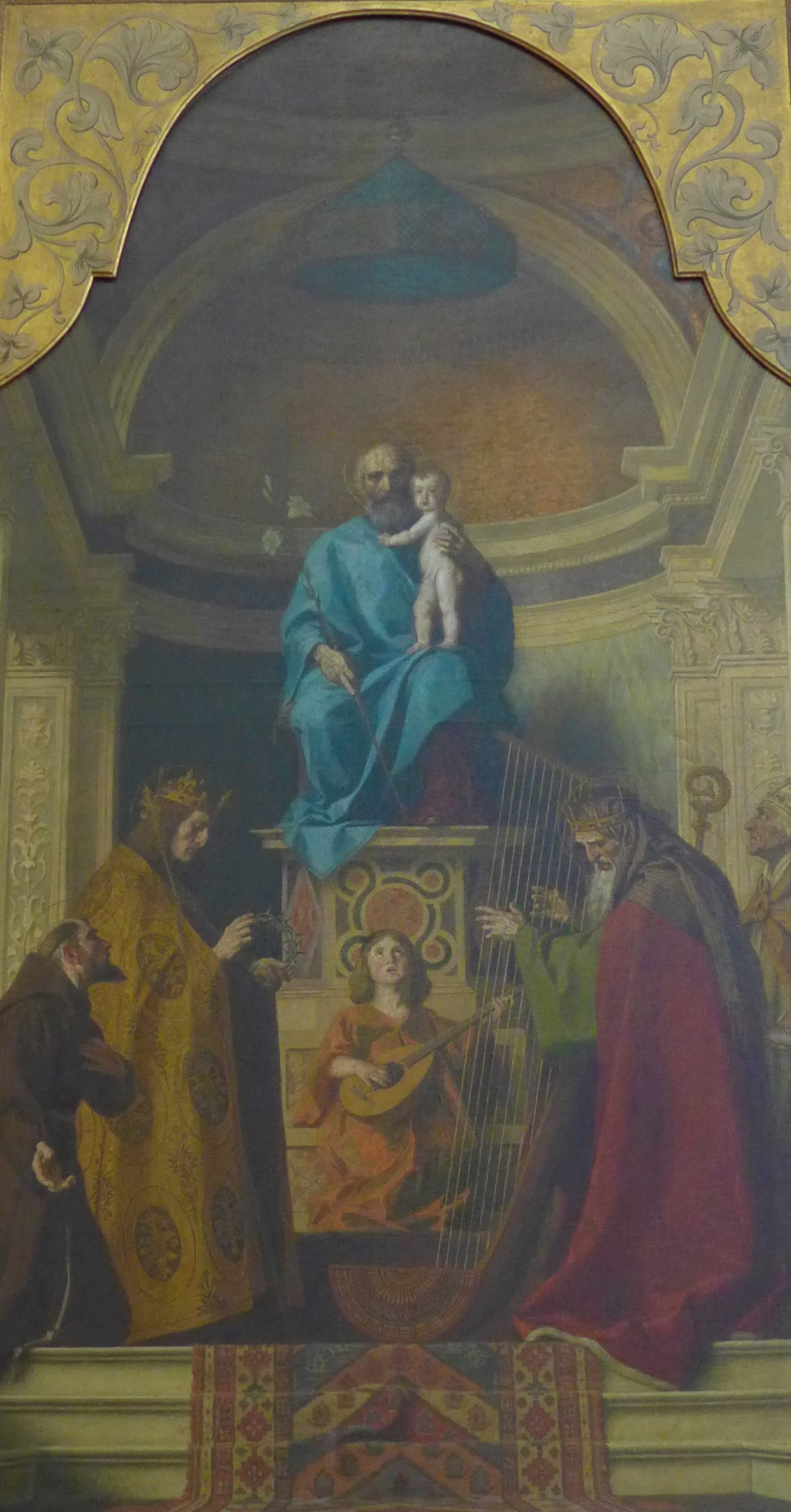 St. Joseph (München), Entwurf zum ehemaligen neobarocken Hochaltargemälde